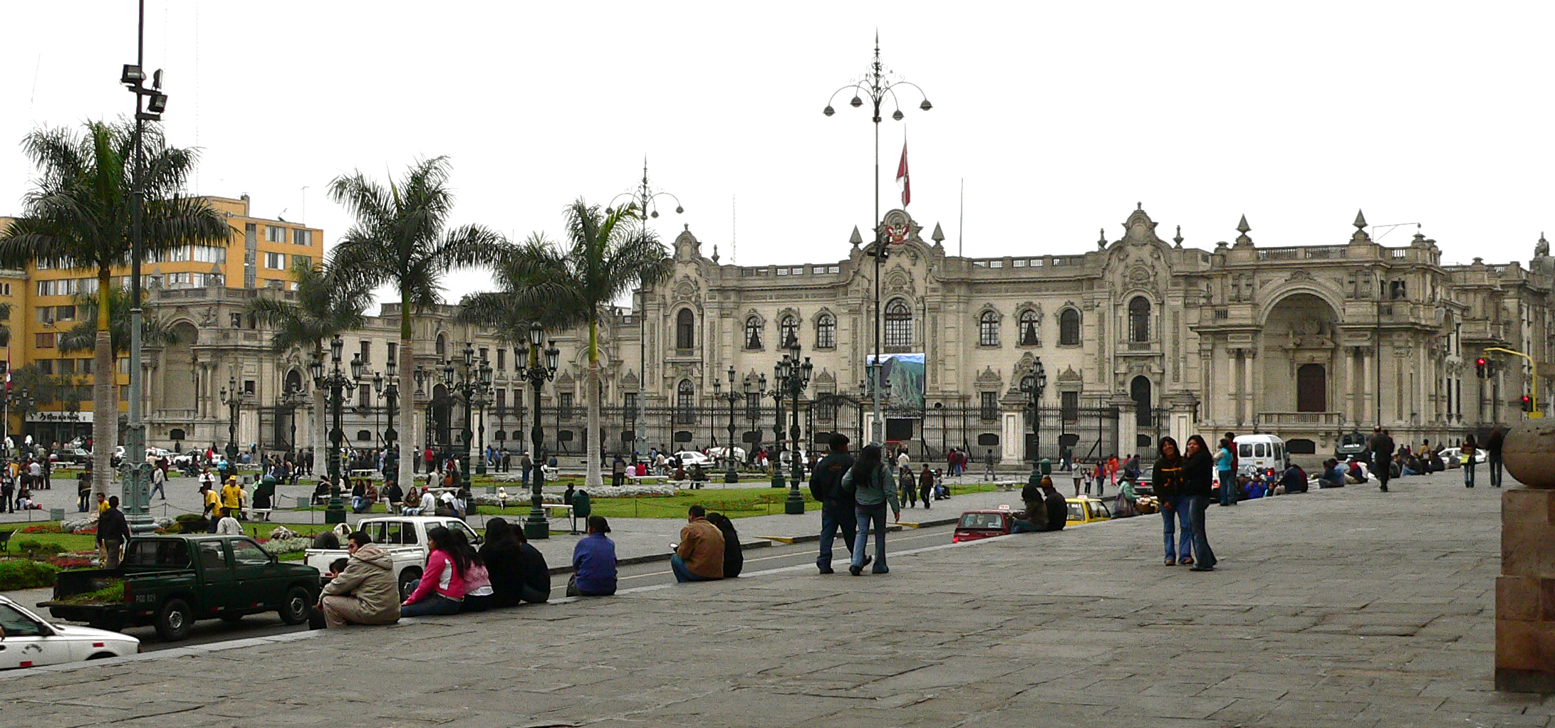 Descripción: Palacio de Gobierno del Perú Lugar: Centro Histórico de Lima Distrito : Cercado de Lima Ciudad : Lima País : Perú Fotógrafo: © Manuel González Olaechea y Franco Fecha de la foto : 8 de julio de 2007